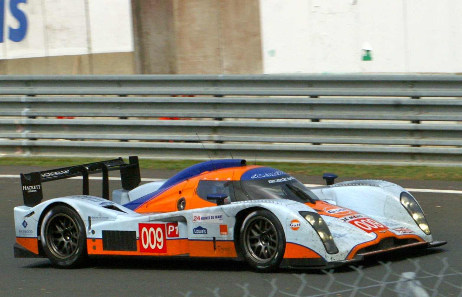 Le Mans 24 Hours, 2010